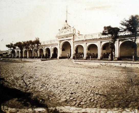 Vista del Cuartel de Artillería de Retiro, anterior a 1883 cuando se le agregó un segundo piso. Se ve la calle Arenales adoquinada y el viejo edificio del 1818.